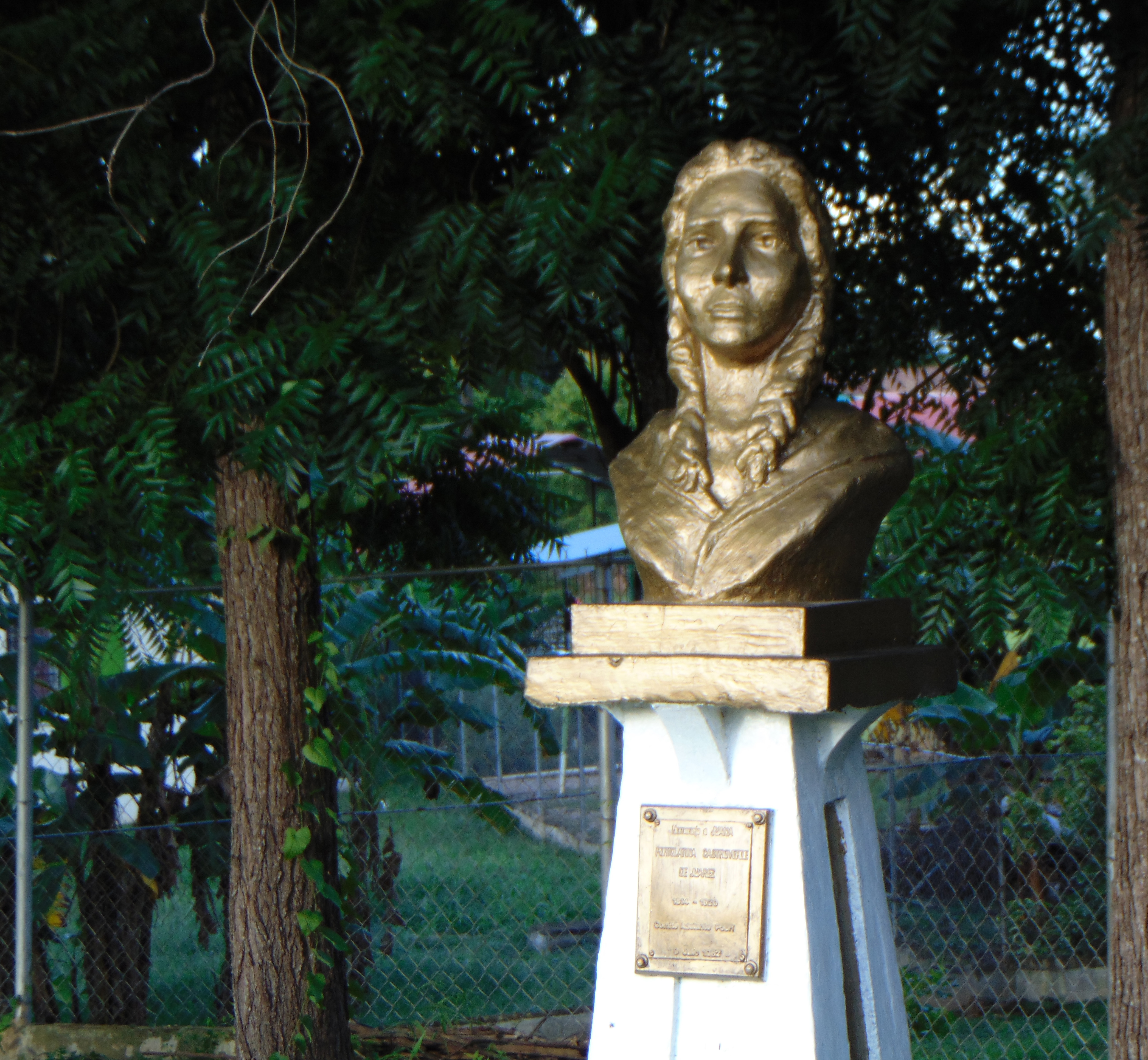 Juana Portolatina Castroverde de Juares, introdujo a este pueblo la tradición y veneración a la madre de Jesús.